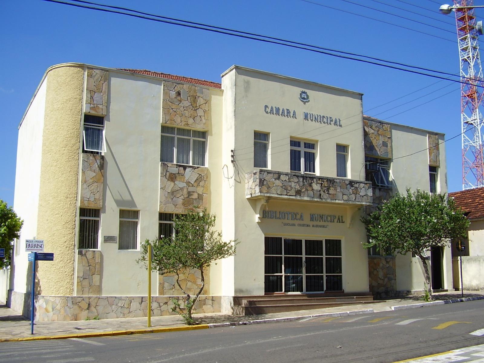 LICENÇA? - Foto tirada de: Câmara de Echaporã ????!!